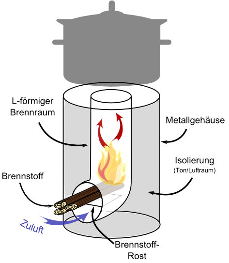 Schematische Darstellung eines Rocket Stove, Bild basiert auf der Zeichnung von NokoBunva